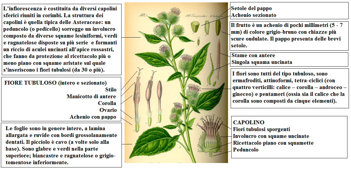 Arctium minus Thome DESC